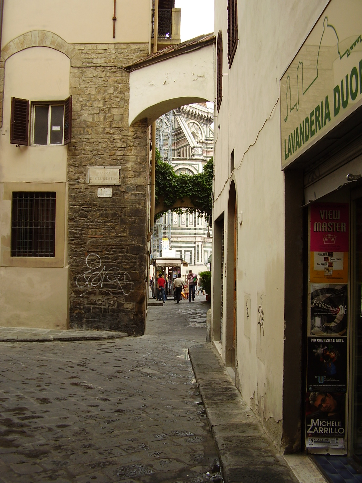 San Benedetto Square (side view of Santa Maria del Fiore), in Florence Italy